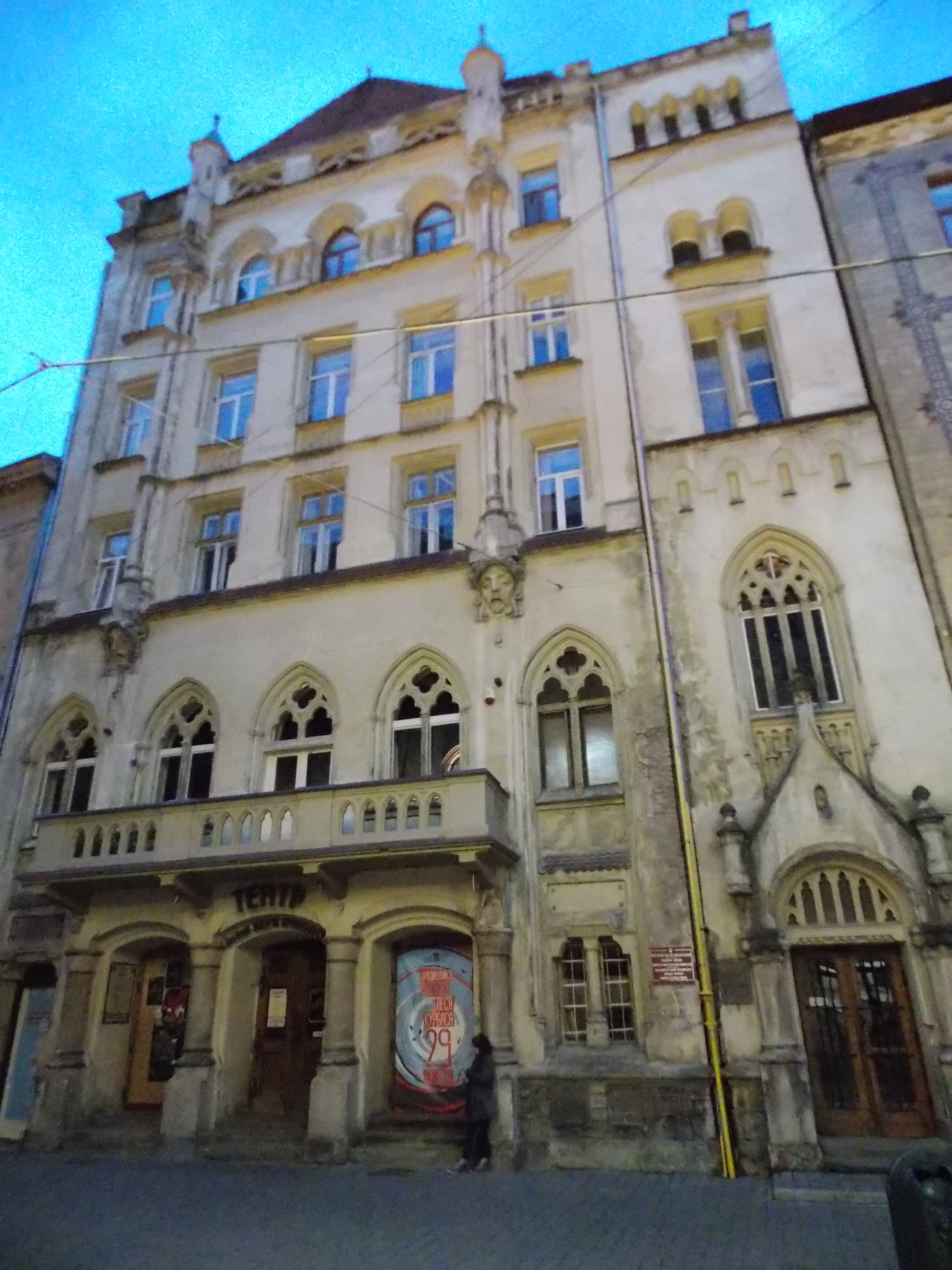 молодіжний театр ім.Курбаса, Львів, Курбаса Л., 3